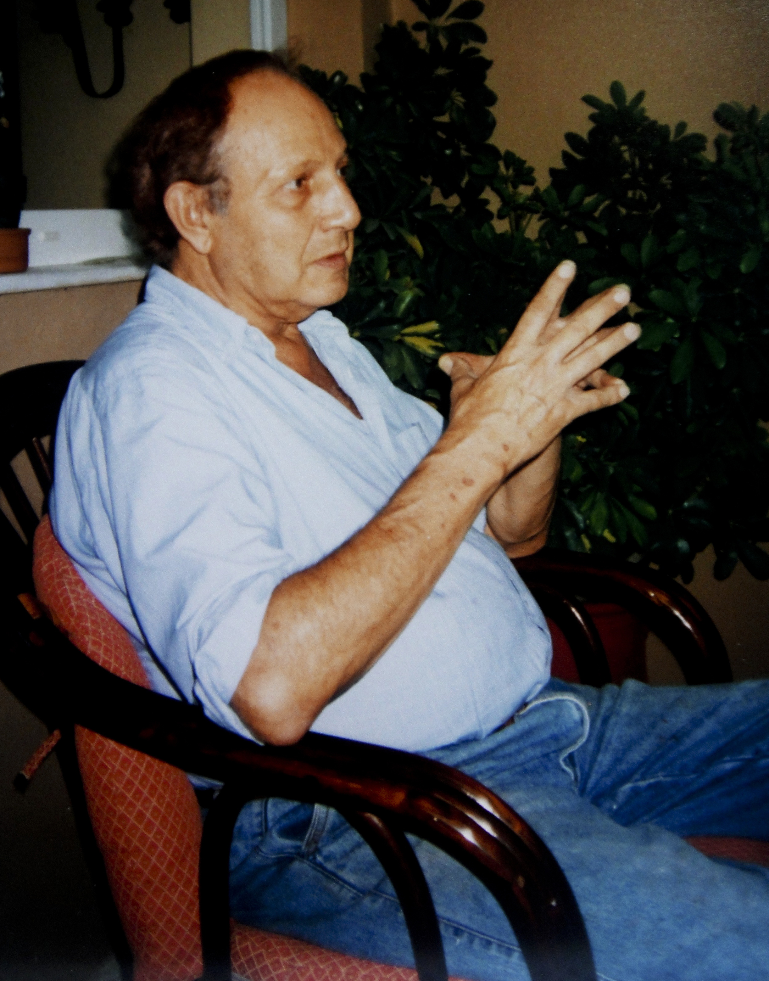 φωτογραφικό πορτραίτο του Γιώργου Θωμά Γεωργιάδη από το μαθητή του, Μάνο Ζερβό